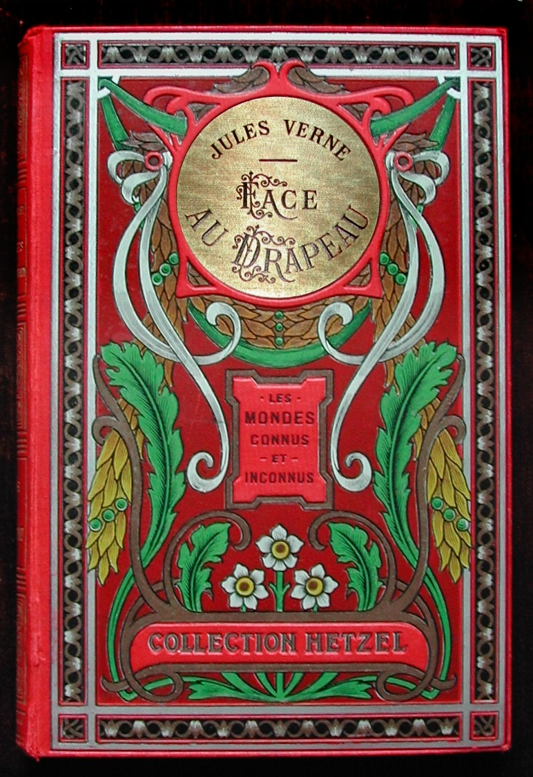 Cartonnage aux feuilles d'acanthe polychrome de Face au drapeau de Jules Verne, éditions Hetzel.